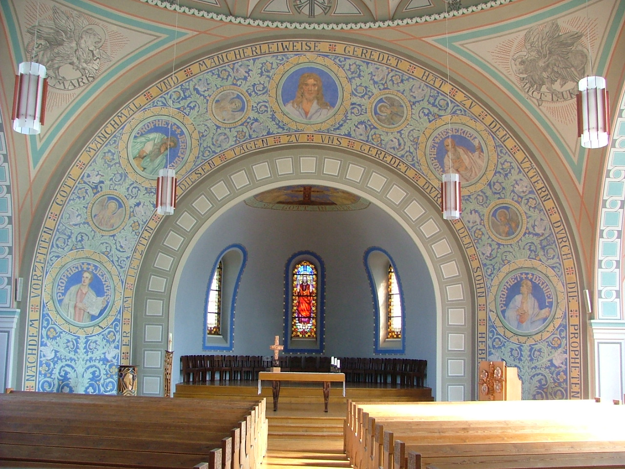 Der obere Kirchsaal der Markuskirche Plauen. 2003 wurde die Originalausmalung wieder frei gelegt.